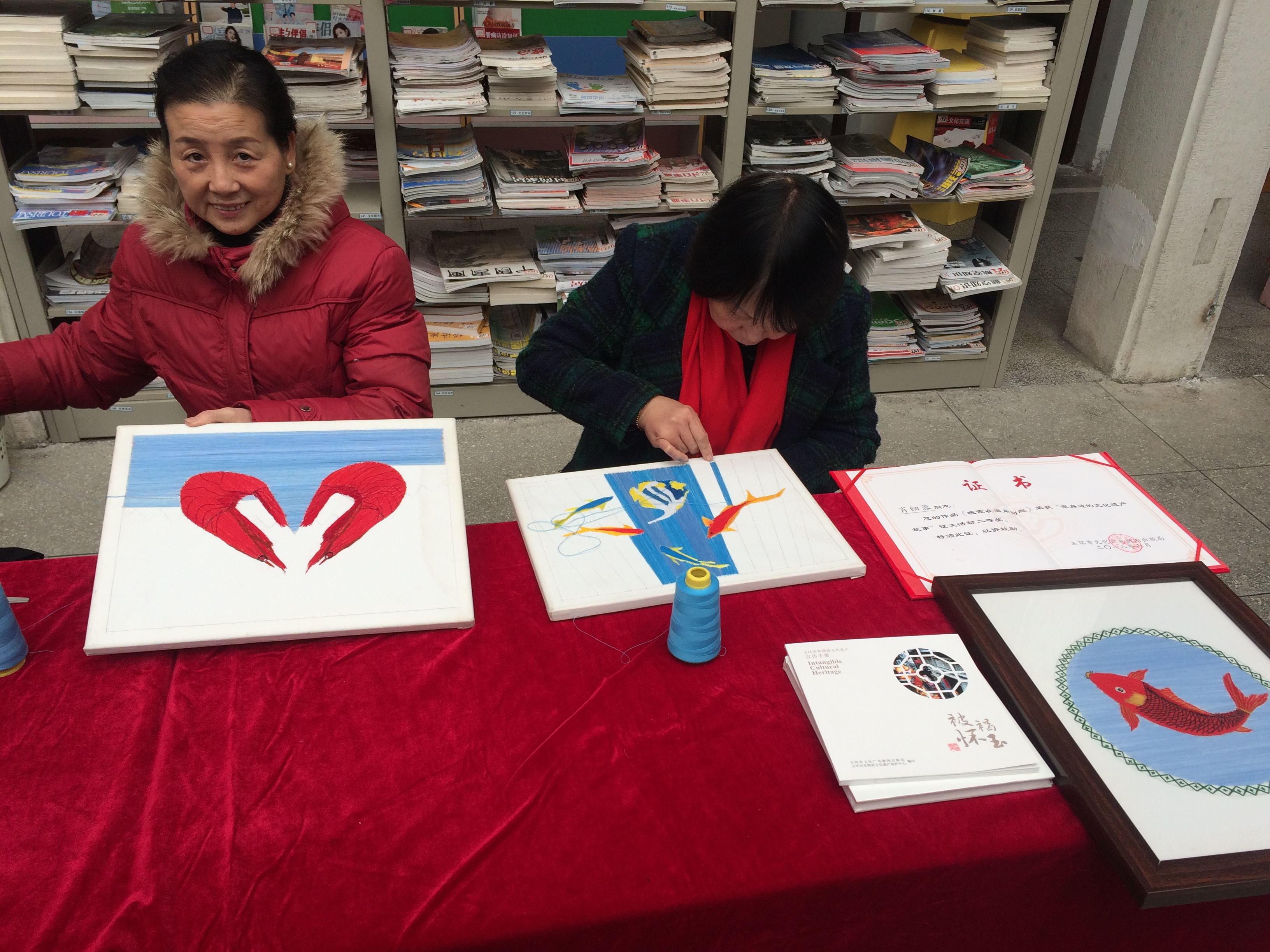 中文（中国大陆）: 玉环渔民画